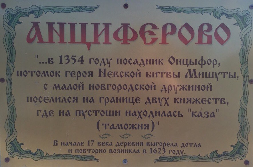 Табличка в деревне Анциферово